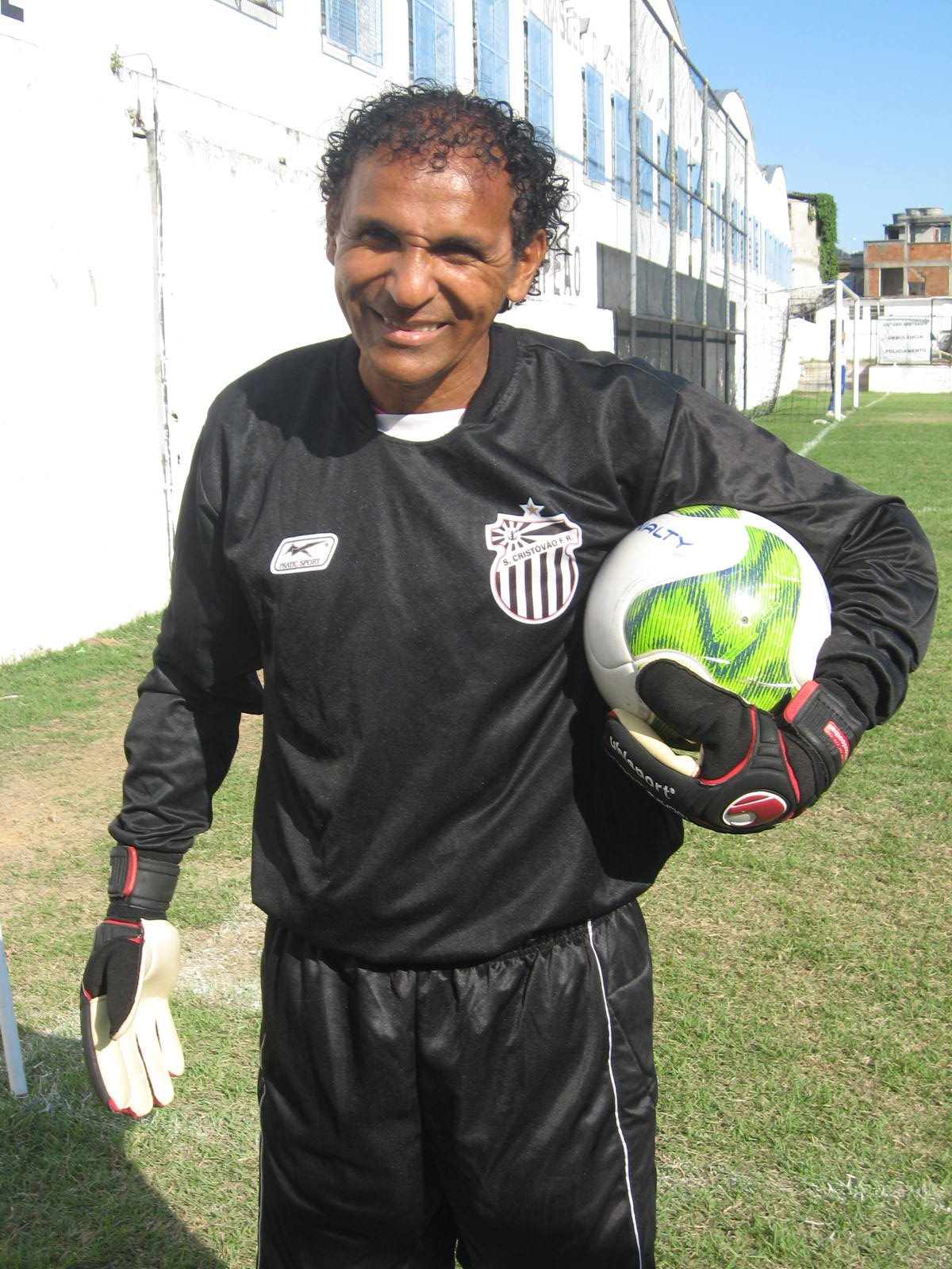 Josenildo (Bellot) posando como goleiro do São Cristóvão em 2011 para as lentes do Junius.